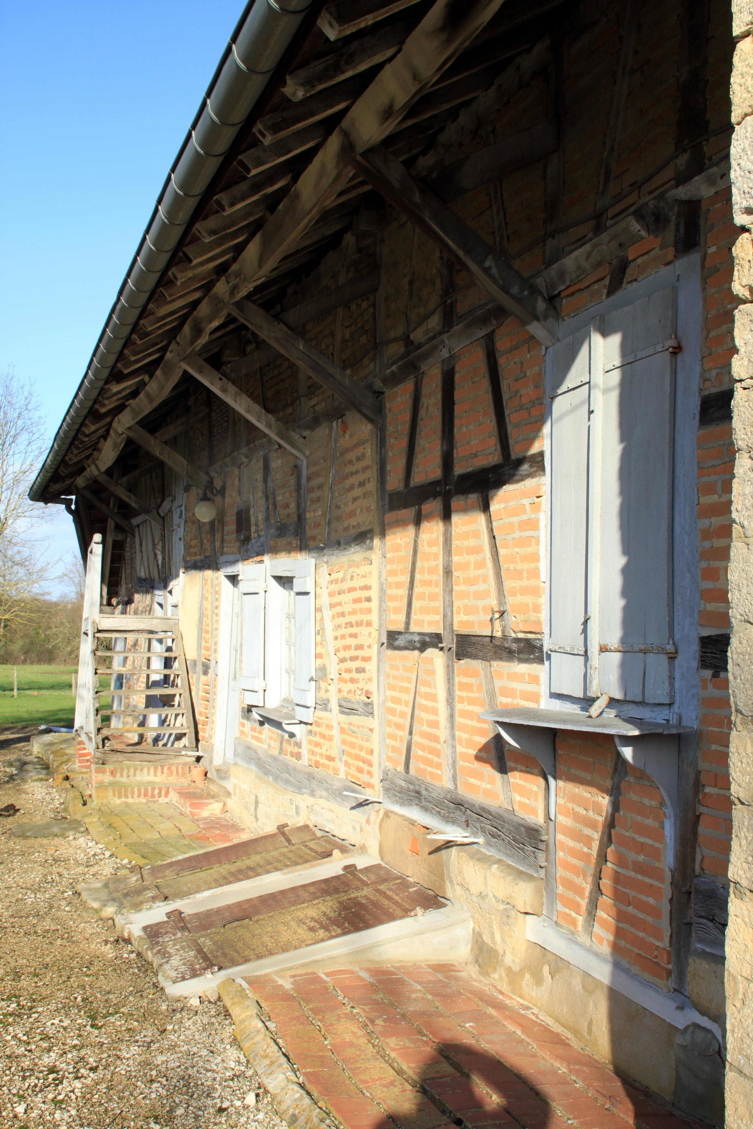 Dachkonstruktion am Bressehaus